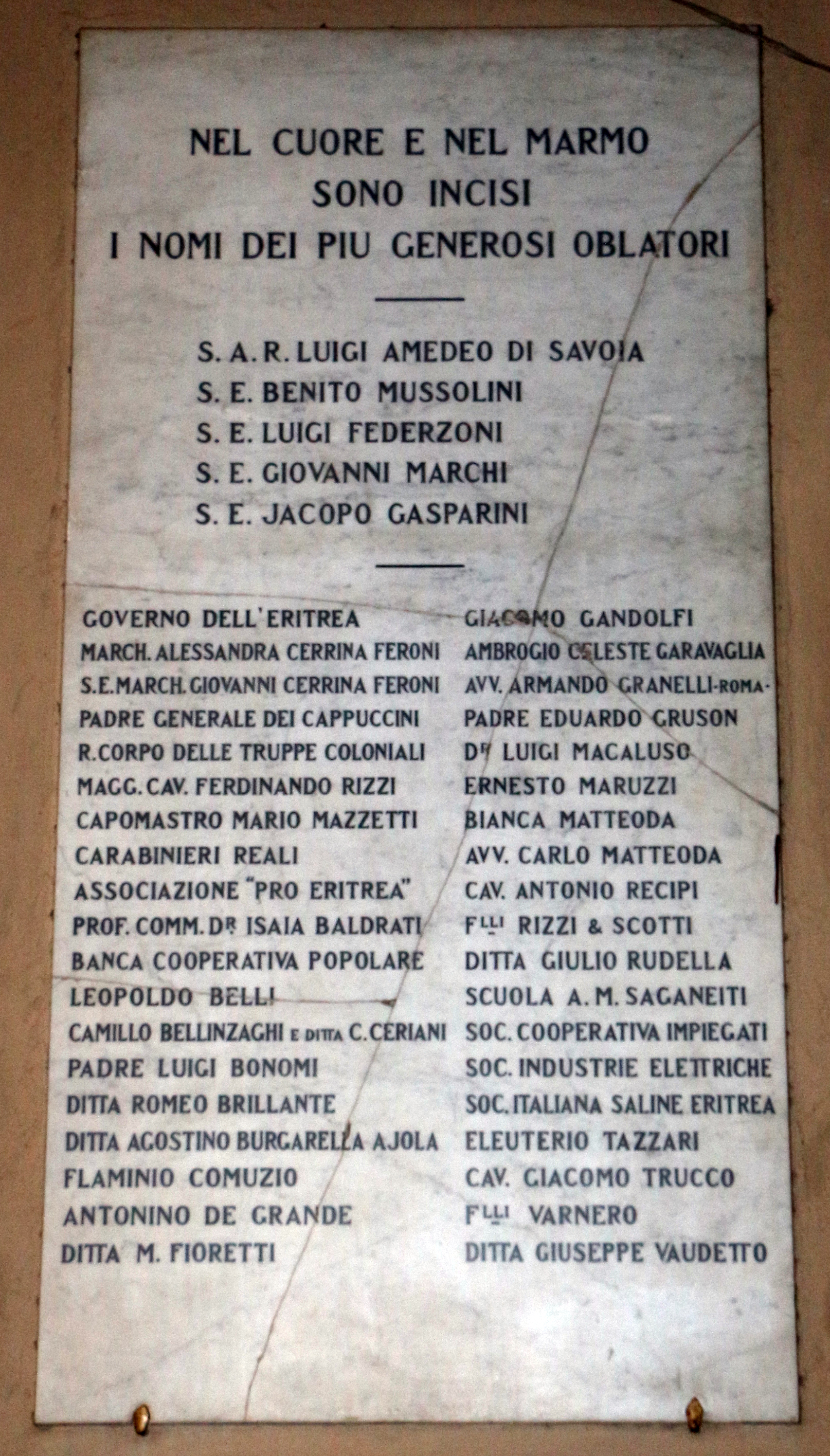 Asmara, cattedrale cattolica, lapide benefattori 02 tra cui benito mussolini.JPG